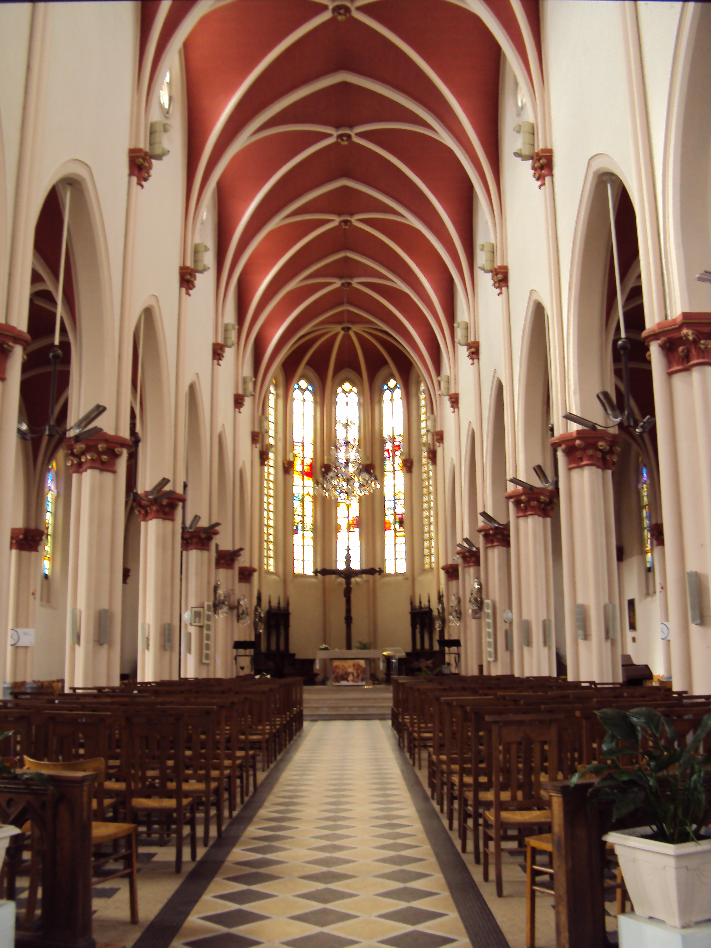 Nef de l'église Saint-Léger à Pérenchies (Nord).